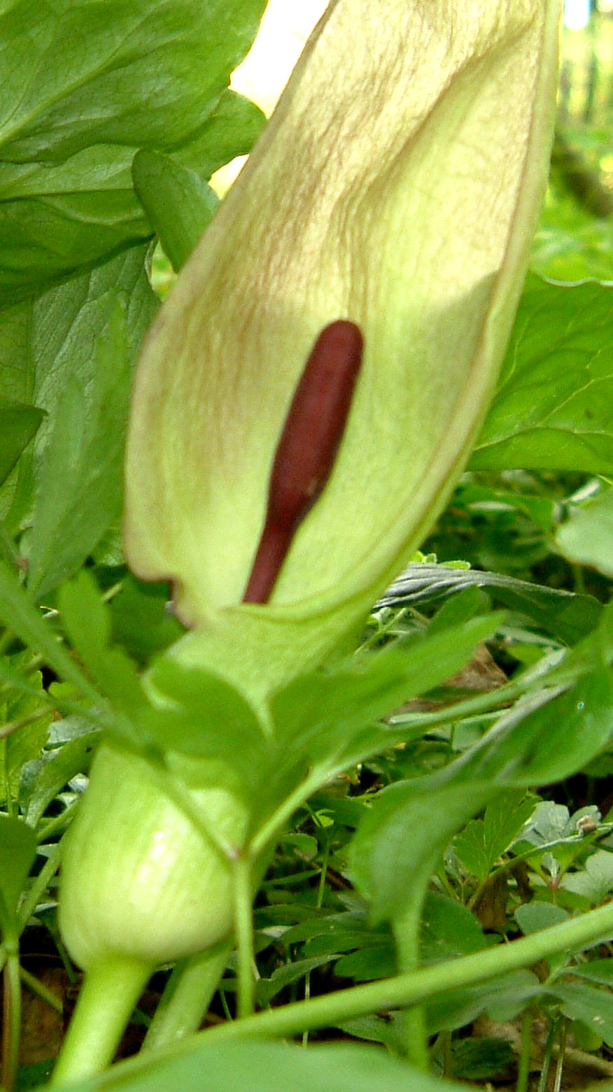 Aronstab (Arum maculatum), _10_Mai_2002